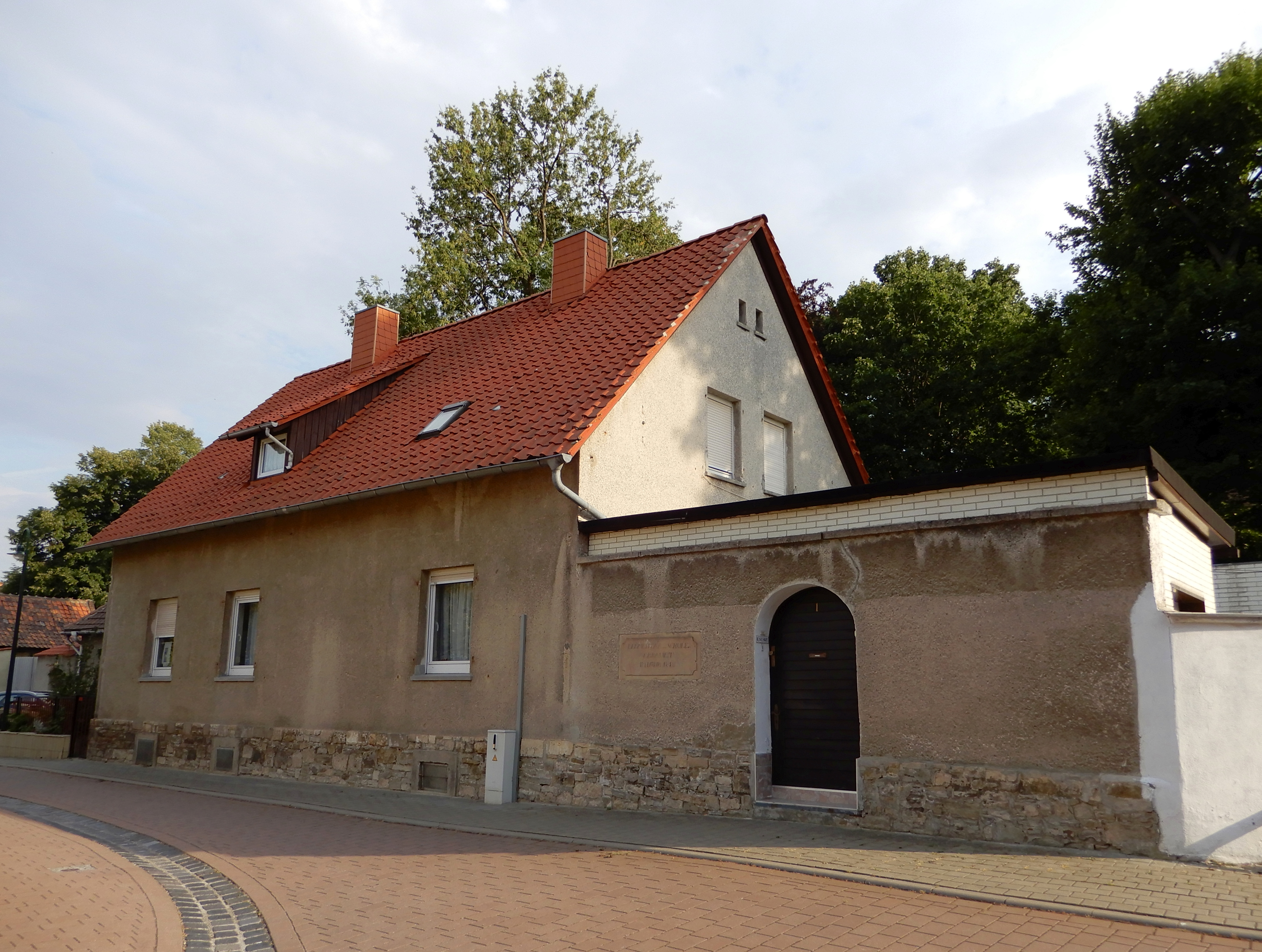 Bauernhof Kirchgasse